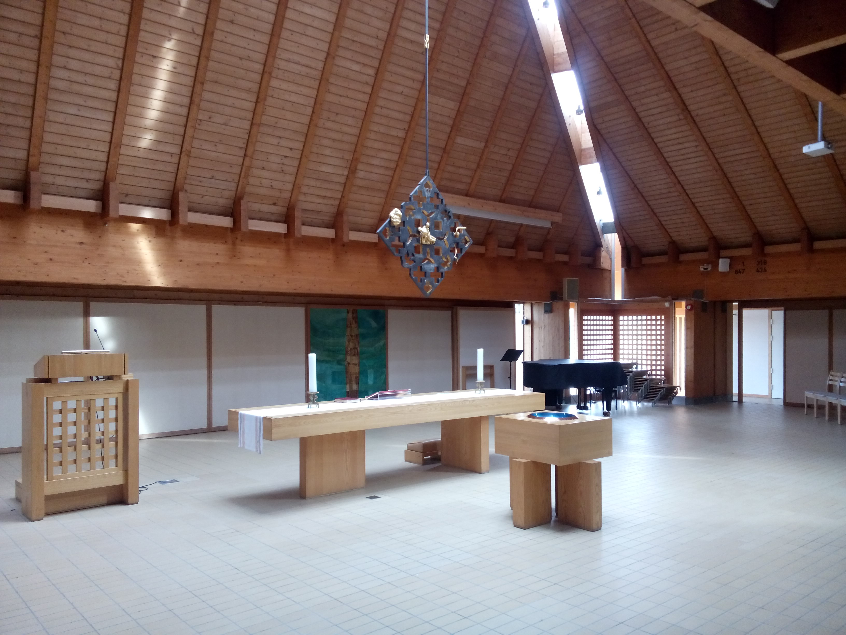 Alterpartiet i Søreide kirke